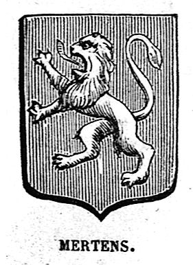 Praenobilis Familia